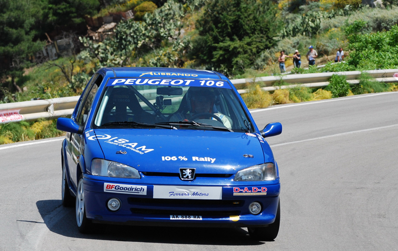 Giovanni Alibrando - Peugeot 106 Rally